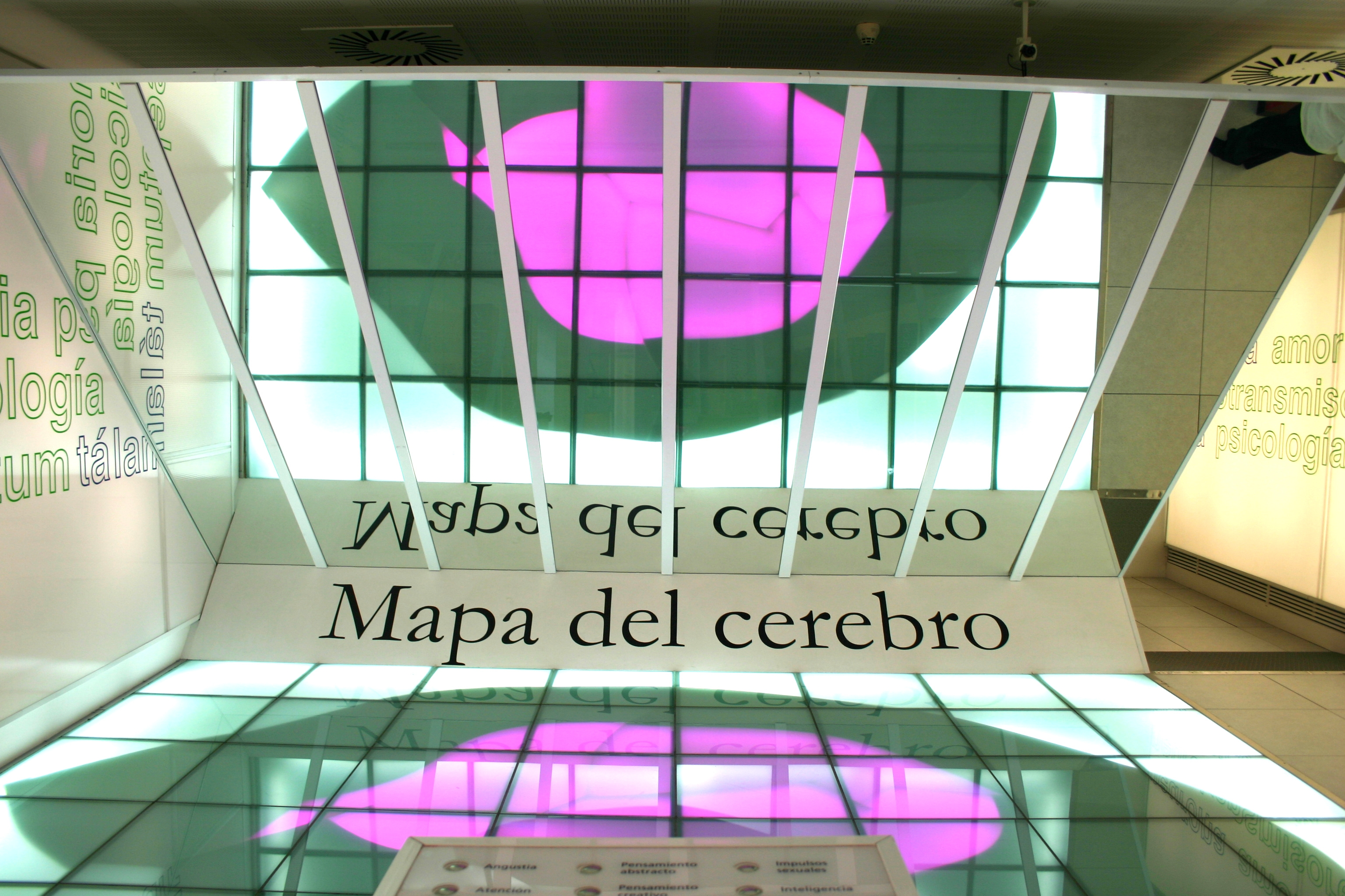 Uno de los módulos de la Sala del Pío del Río Hortega del Museo de la Ciencia de Valladolid